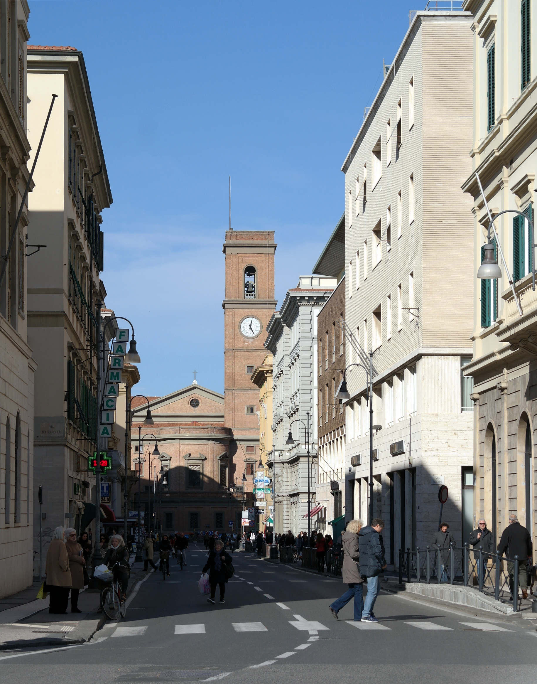 Via Cairoli a Livorno e abside del Duomo